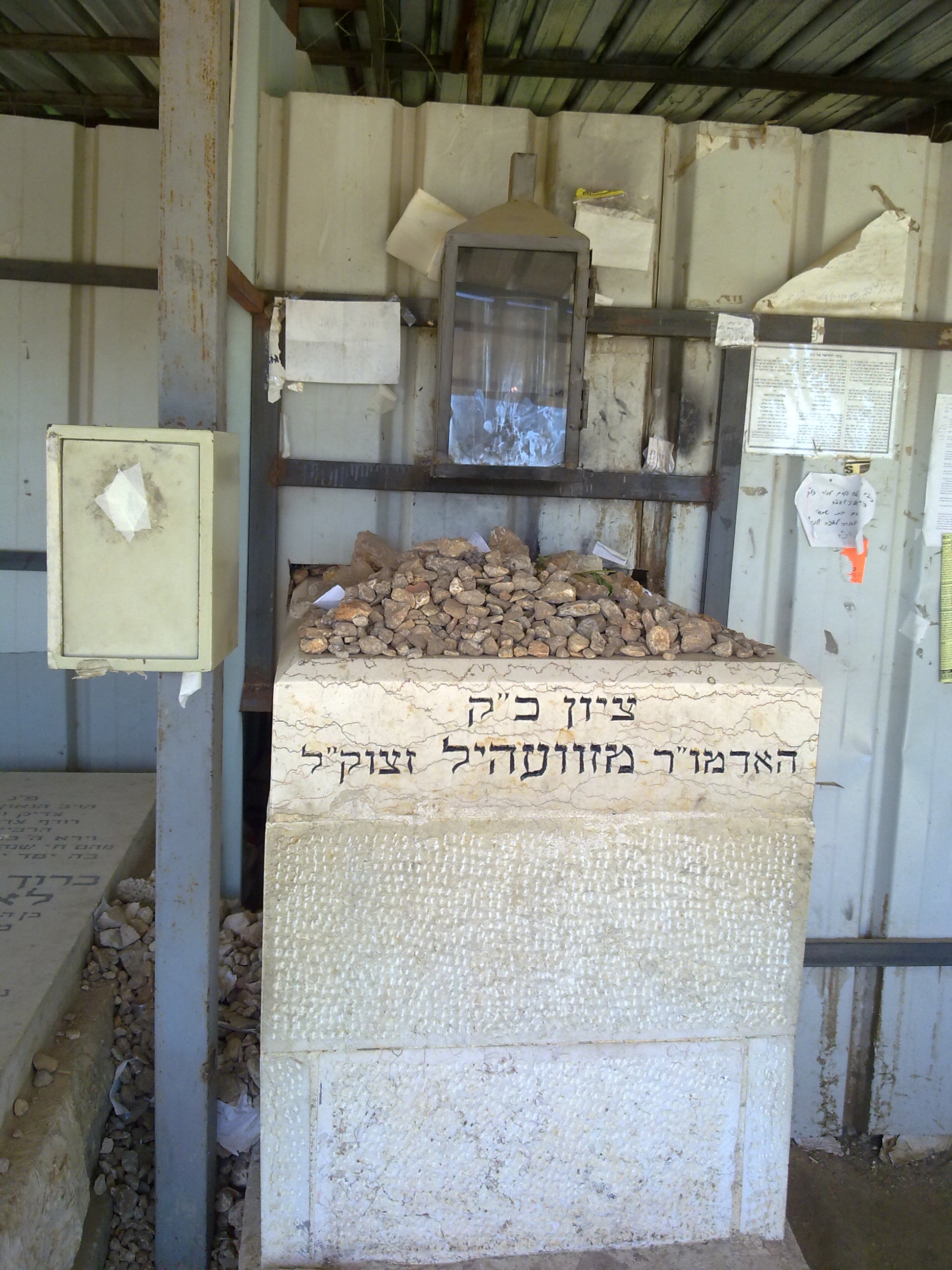 ציונו של הרבי מזוועיהל